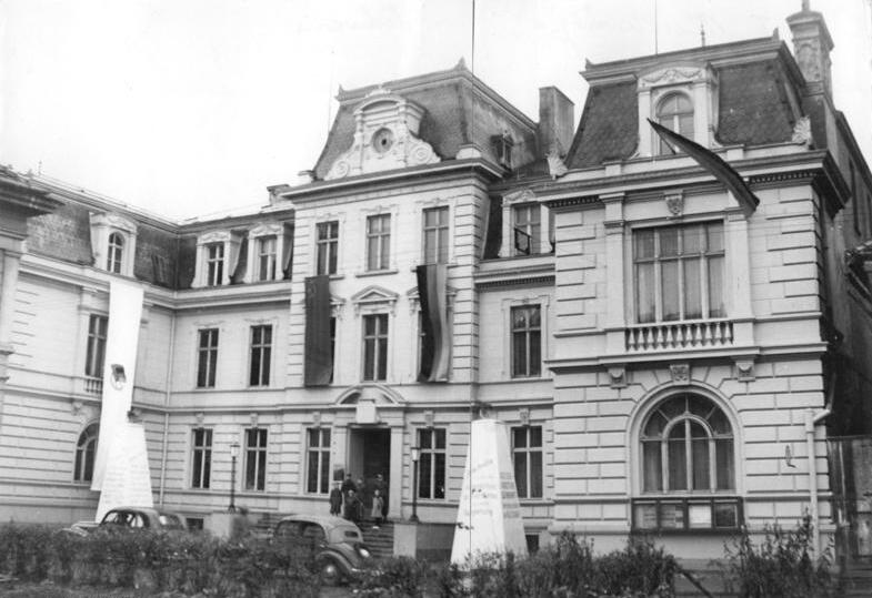 Zentralbild Krueger Vo-Ho. 13.11.1953 Das Haus der Deutsch-Sowjetischen Freundschaft "Maxim Gorki" in Schwerin Im November 1953, im Monst der Deutsch-Sowjetischen Freundschaft, herrscht im Schweriner "Maxim-Gorki-Haus" besonders reges Leben. In den ersten drei Quartalen deses Jahres war das "Maxim Gorki-Haus" Sieger im Wettbewerb der Häuser der Deutsch-Demokratischen Freundschaft der Deutschen Demokratischen Republik und auch für das vierte Quartal haben die Schweriner Freunde die berechtigte Hoffnung, die Fahne siegreich zu verteidigen. (Näheres siehe Begleittext) UBz: Das "Maxim-Gorki-Haus" liegt an der Puschkin-Strasse in Schwerin, 2 Grosse der Weltgeschichte werden hier geehrt, und der Geist, der din diesem Haus der Deutsch-Sowjetischen Freundschaft herrscht, macht ihnen Ehre.